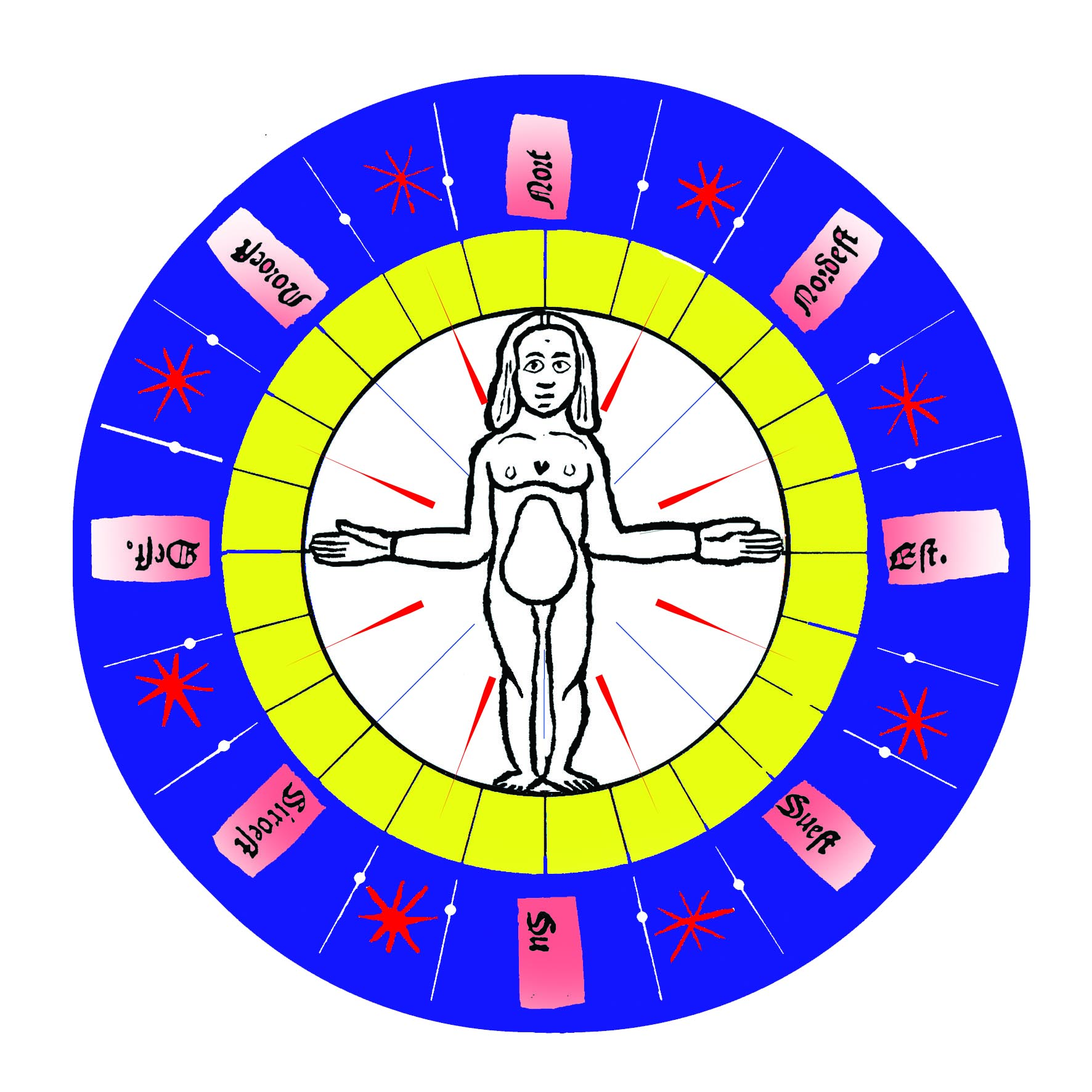 Roue Pôle-Homme de Pierre Garcie - 1520 redessinée par Bernard de Maisonneuve